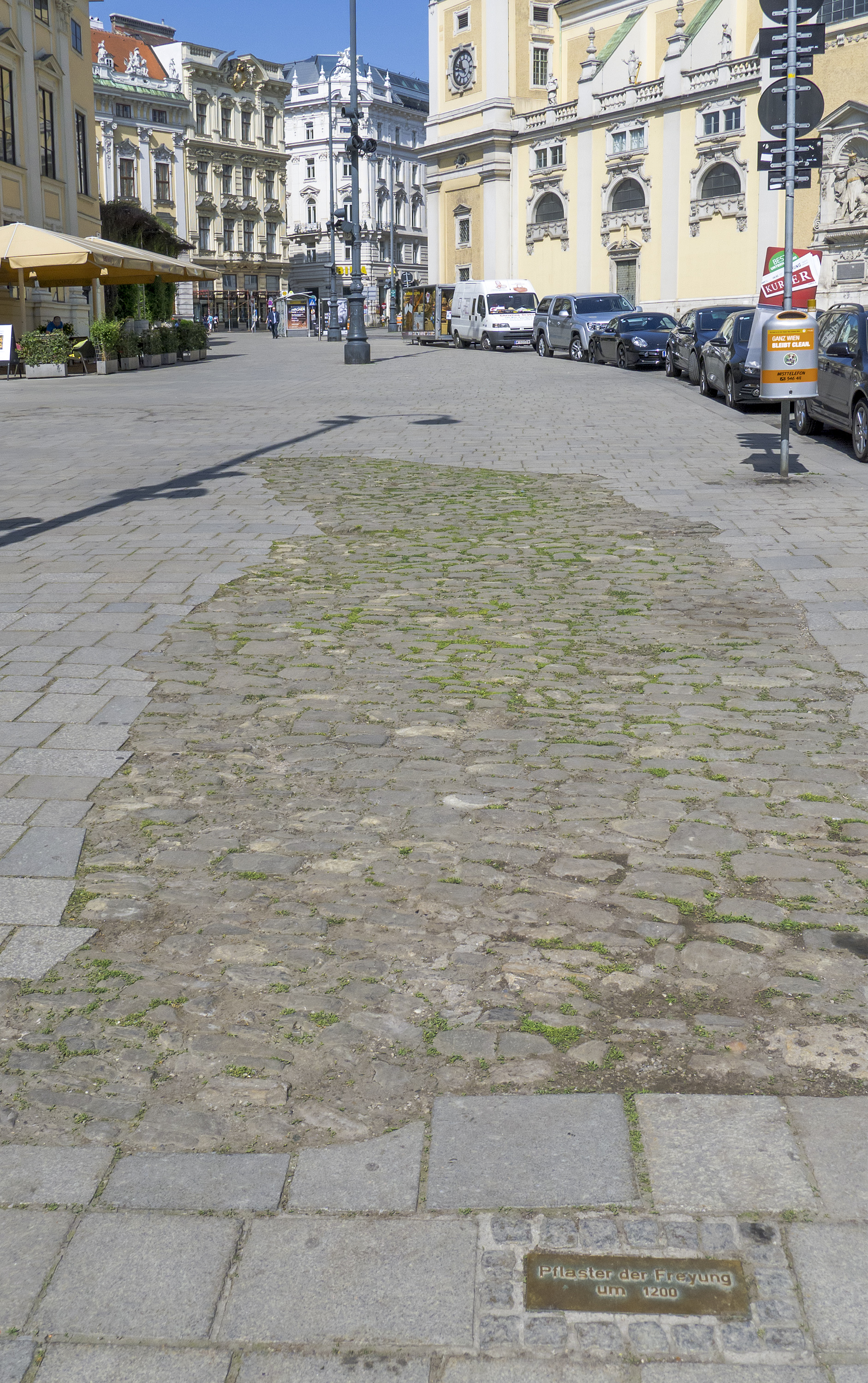 Mittelalterliche Pflastersteine in Wien 1, Freyung, Richtung Nordwesten